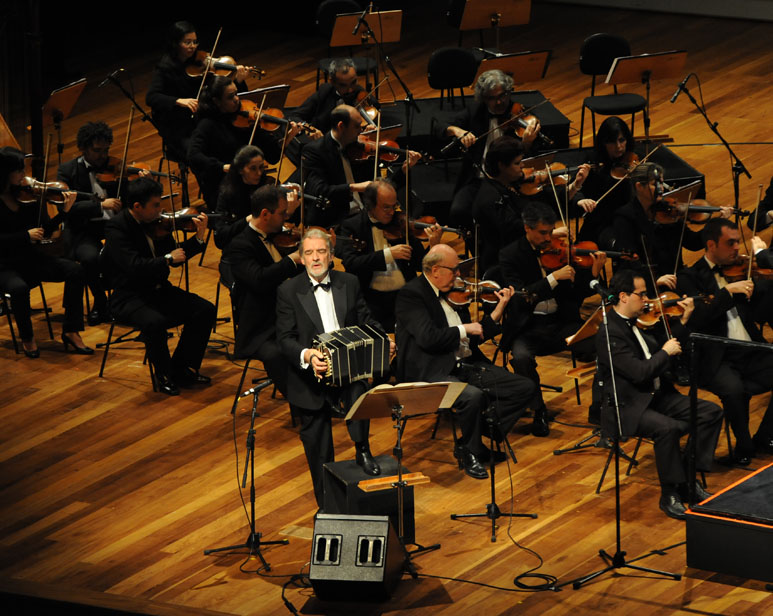 Jazz Sinfônica e Rodolfo Mederos. Auditório Ibirapuera. São Paulo. Brasil. 12/06/2009.